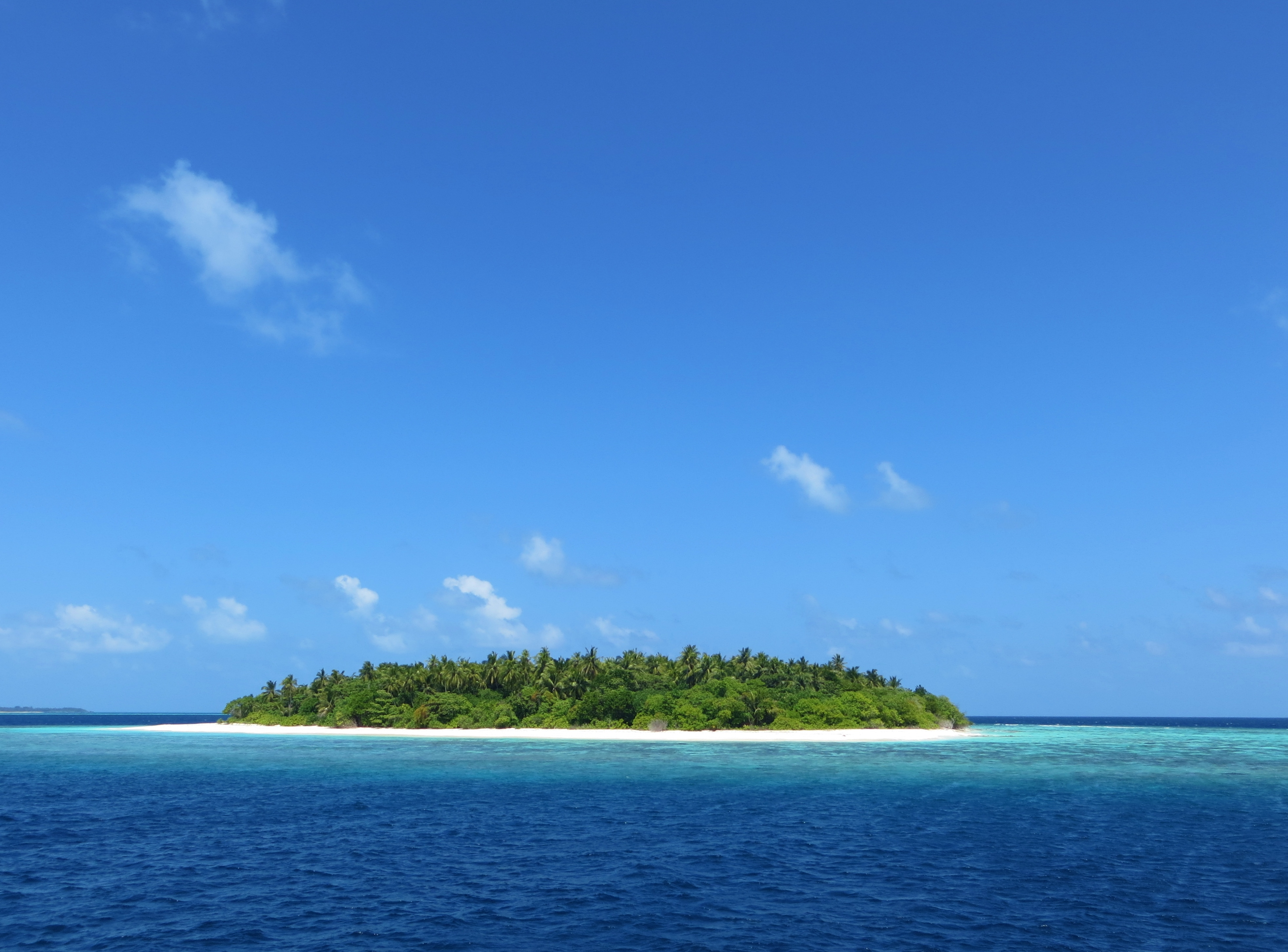 Une île déserte typique des Maldives (Atoll de Baa).